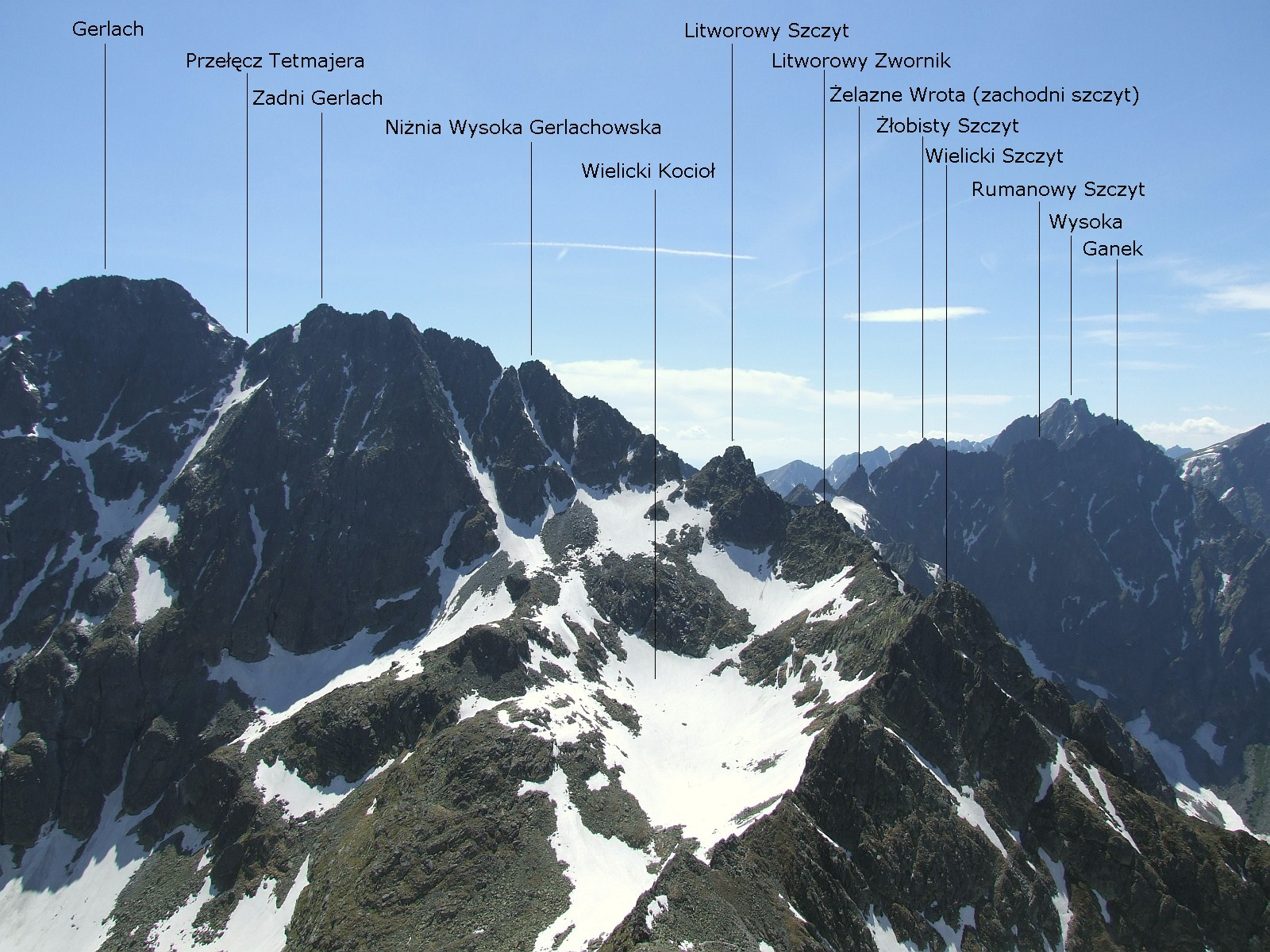 Zadni Gerlach i Wielicki Kocioł. Widok z Małej Wysokiej